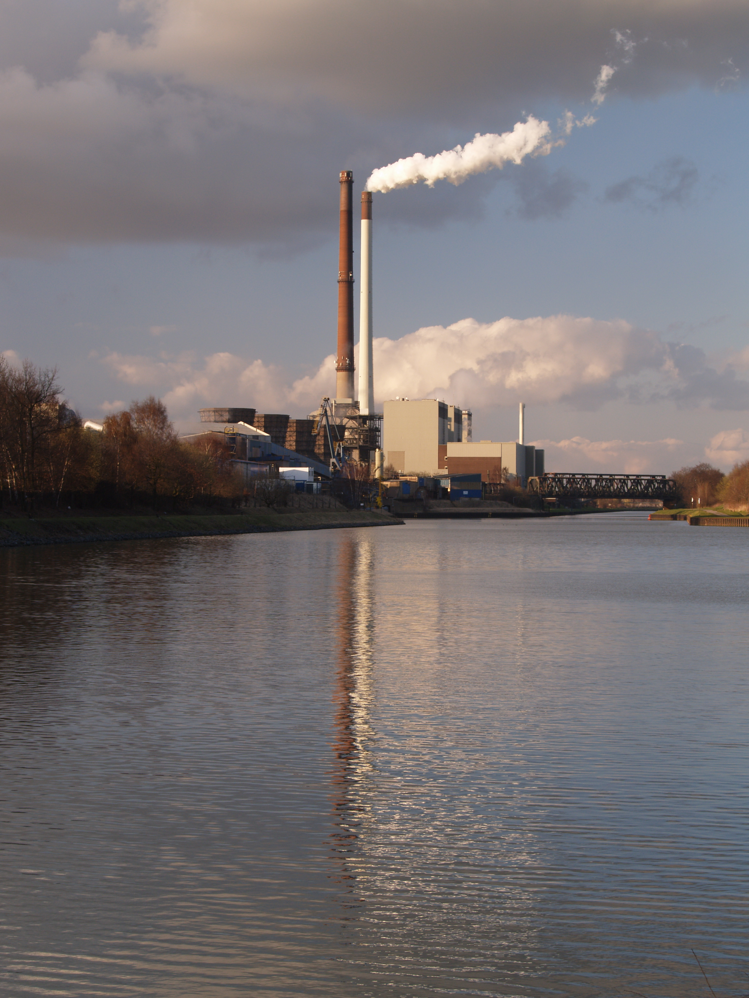 Coal power plant in Datteln (Germany) at the Dortmund-Ems-Kanal